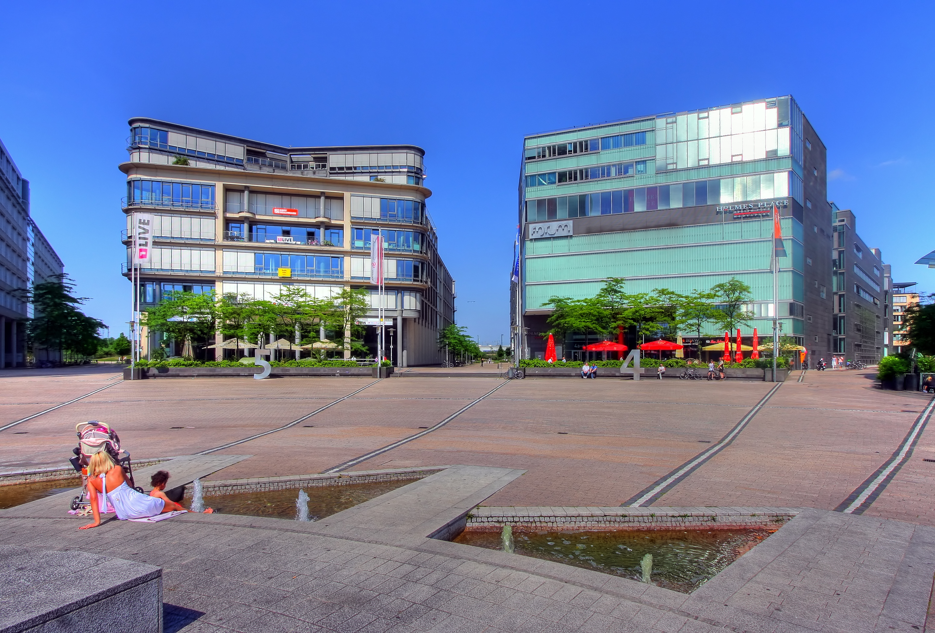 Mediapark Köln, Häuser 5 und 4. Im Vordergrund der Brunnen auf der Platzmitte Mediapark 4: Architekt: Herman Hertzberger, Bauzeit: 2001-2003 Mediapark 5: Architekt: Miroslav Volf, Bauzeit: 1992-1994